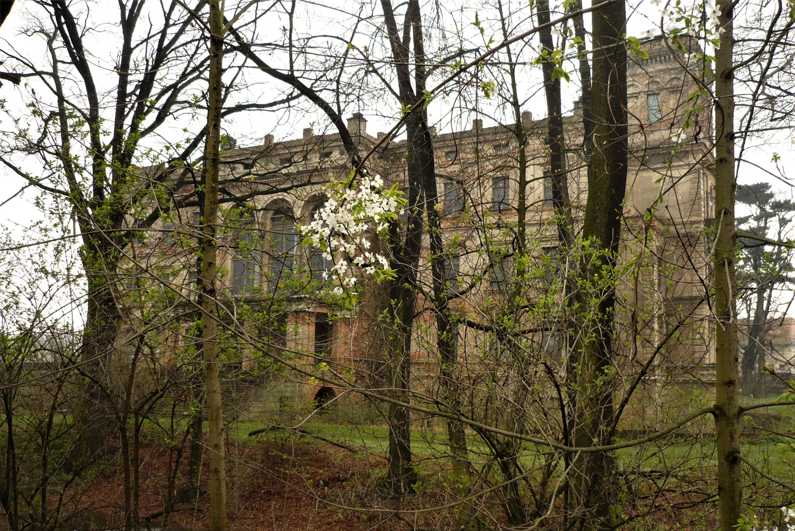 Pałac w Mrowinach